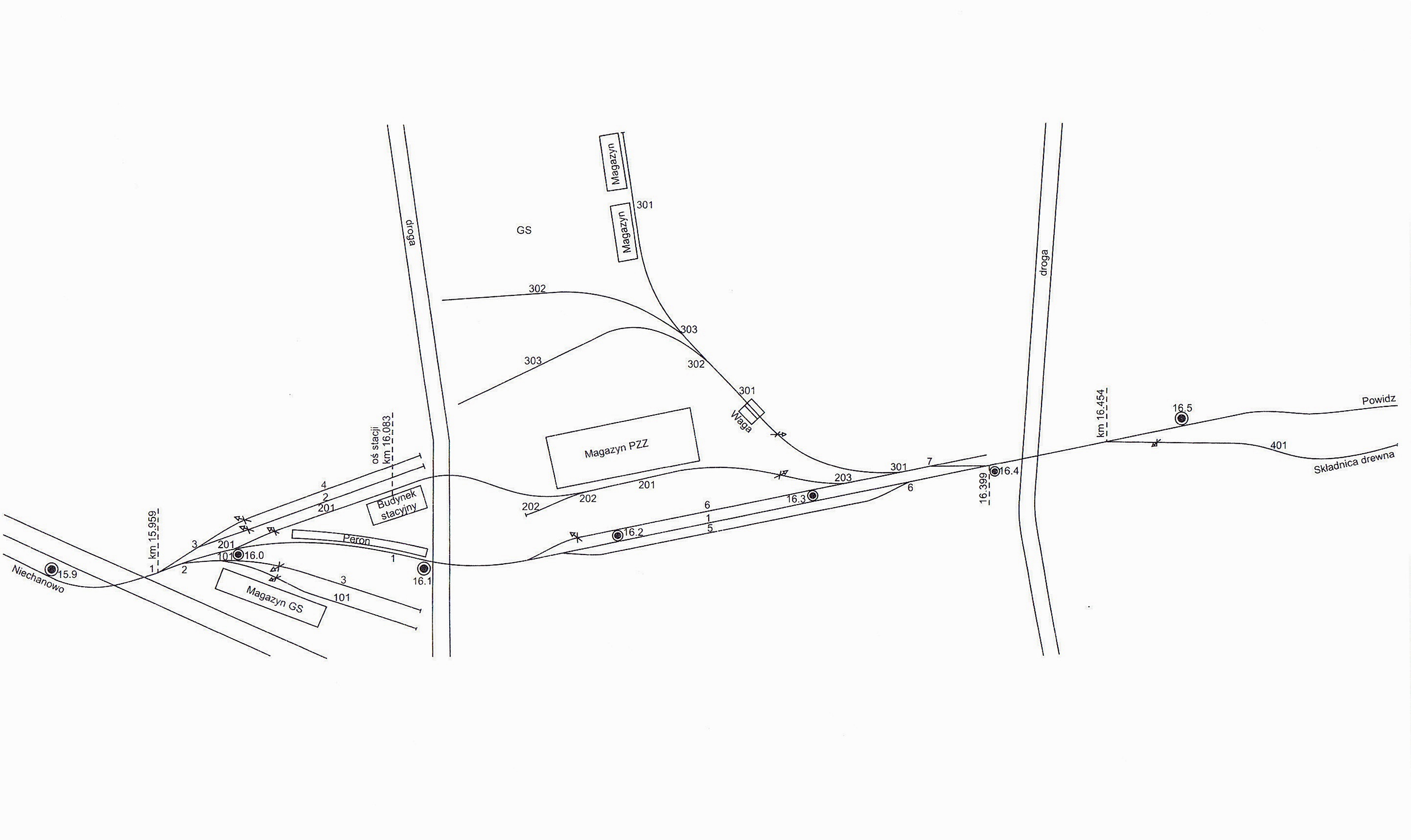 Stacja Witkowo- stan na 25.05.1962r.